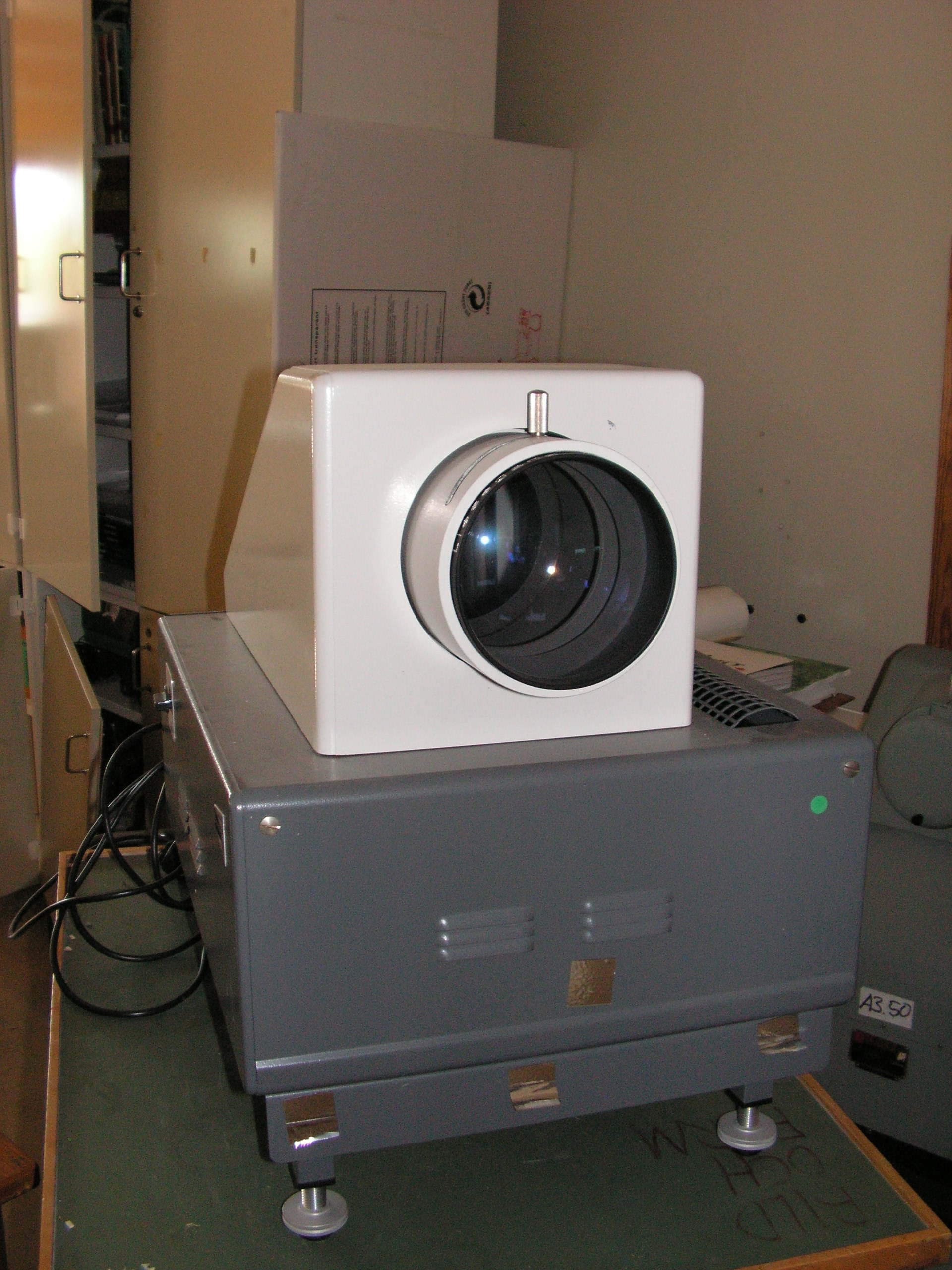 Episkop skoptikon Foto: Stefan linder